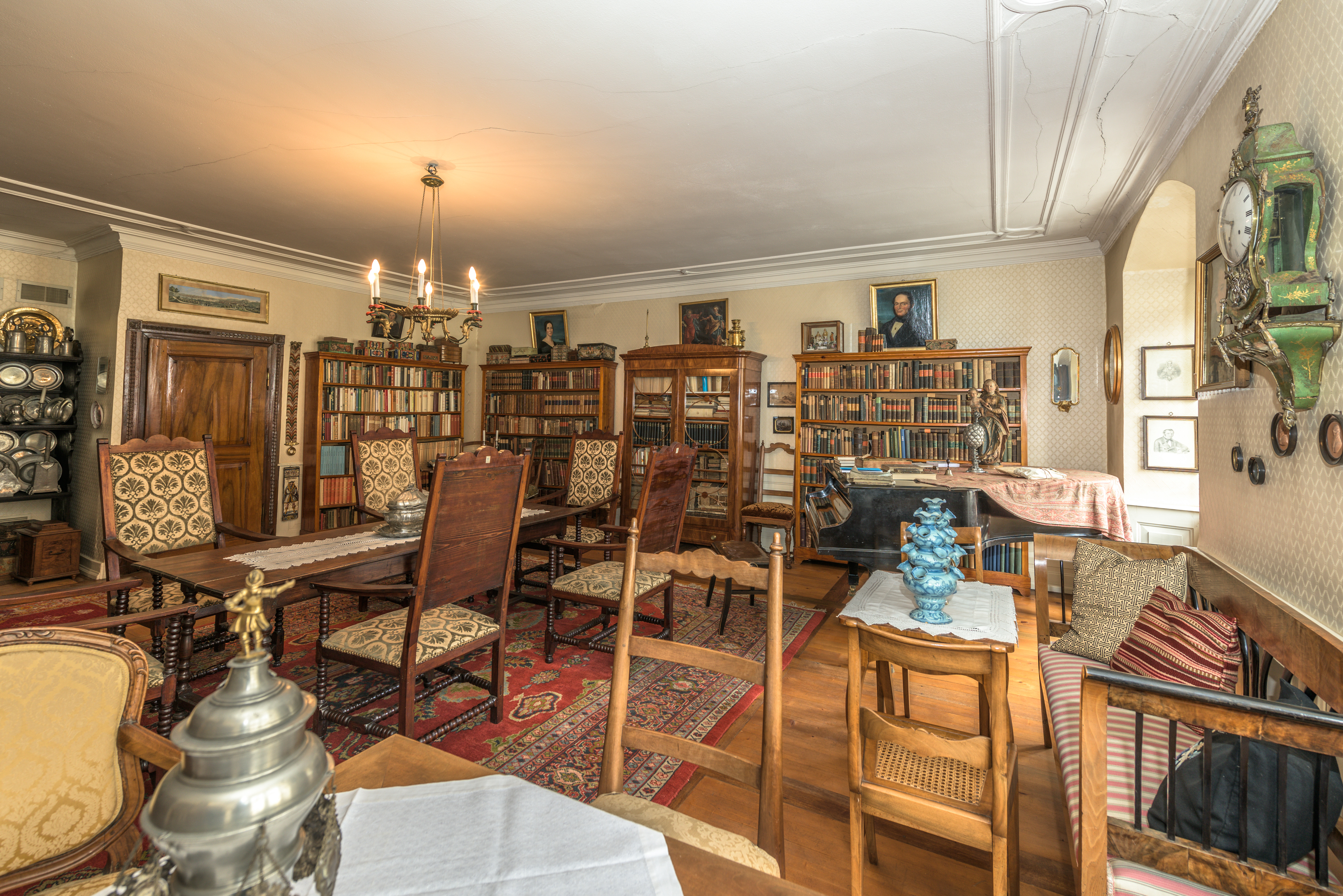 Bibliothek der Stiftung zum Goldenen Leuen